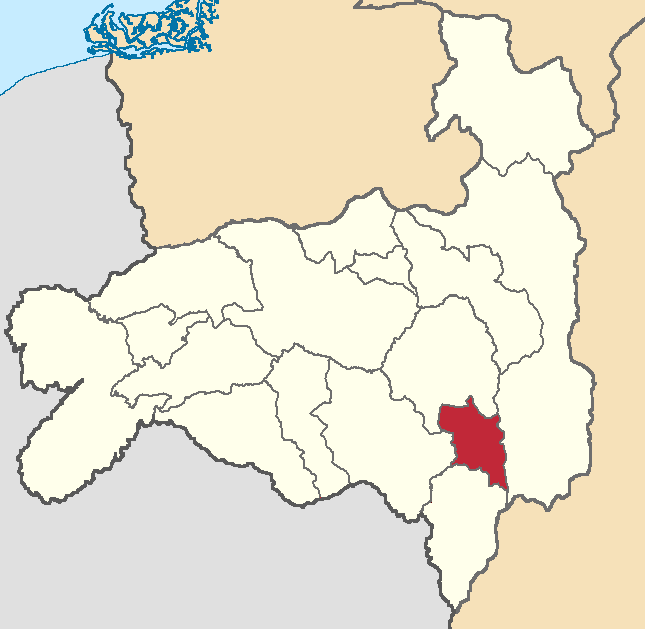 Mapa localizador del cantón en Loja, Ecuador